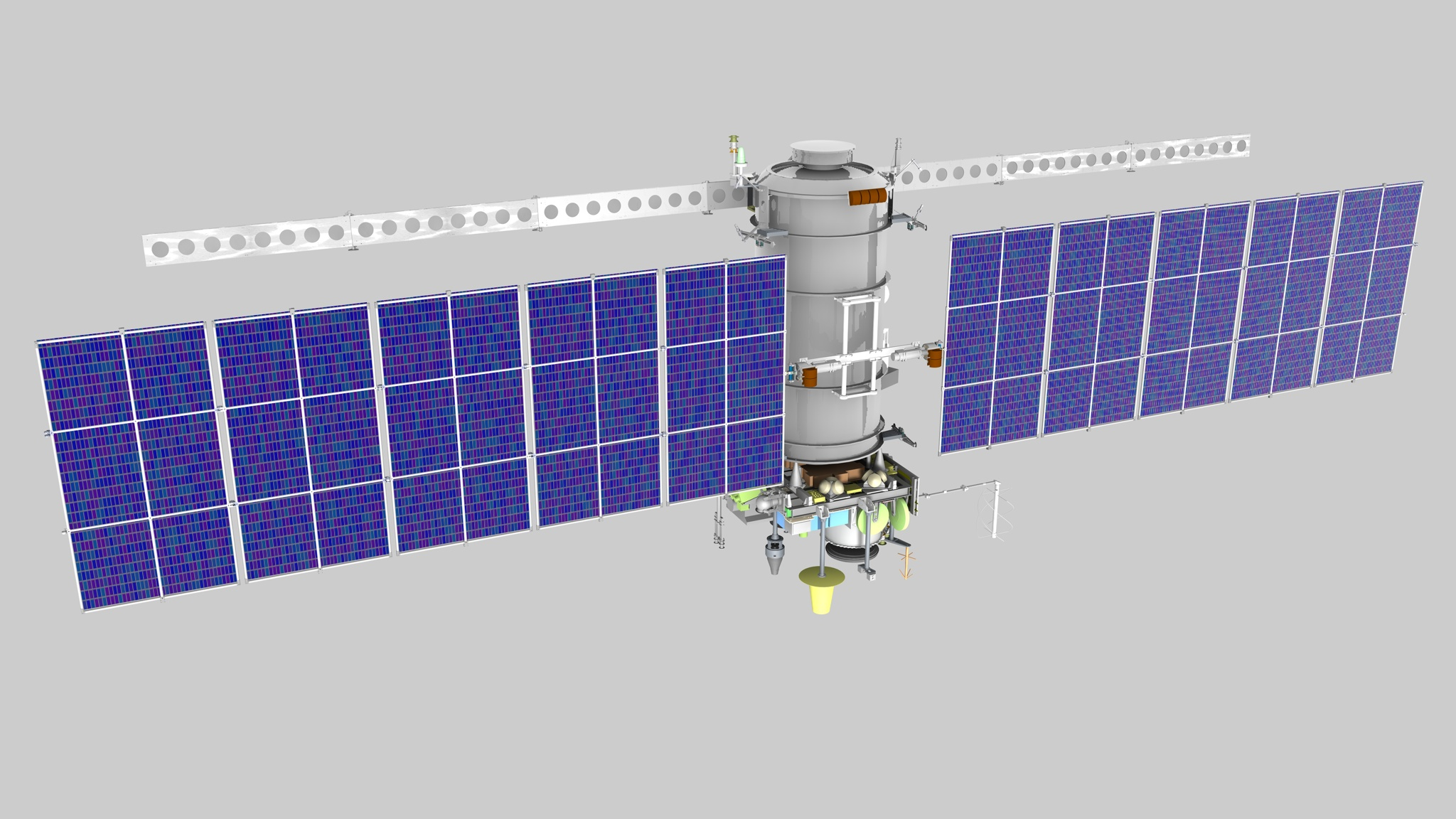 модель КА "Метеор-М"№1 рабочем положении